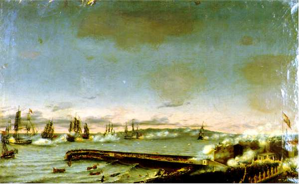 La obra representa la batalla de Santa Cruz de Tenerife, librada en 1797.